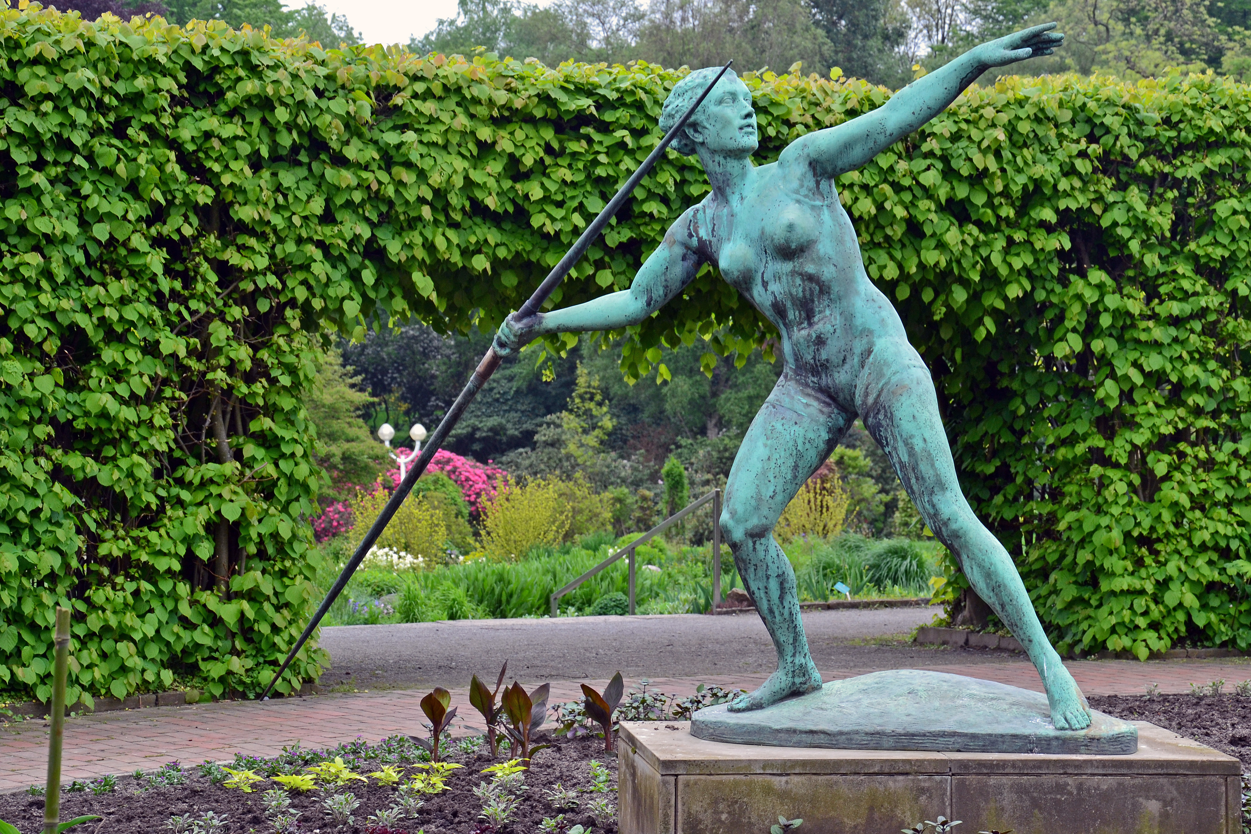 Skulptur im Grugapark Essen: Ernst Seger, Speerwerferin 1937